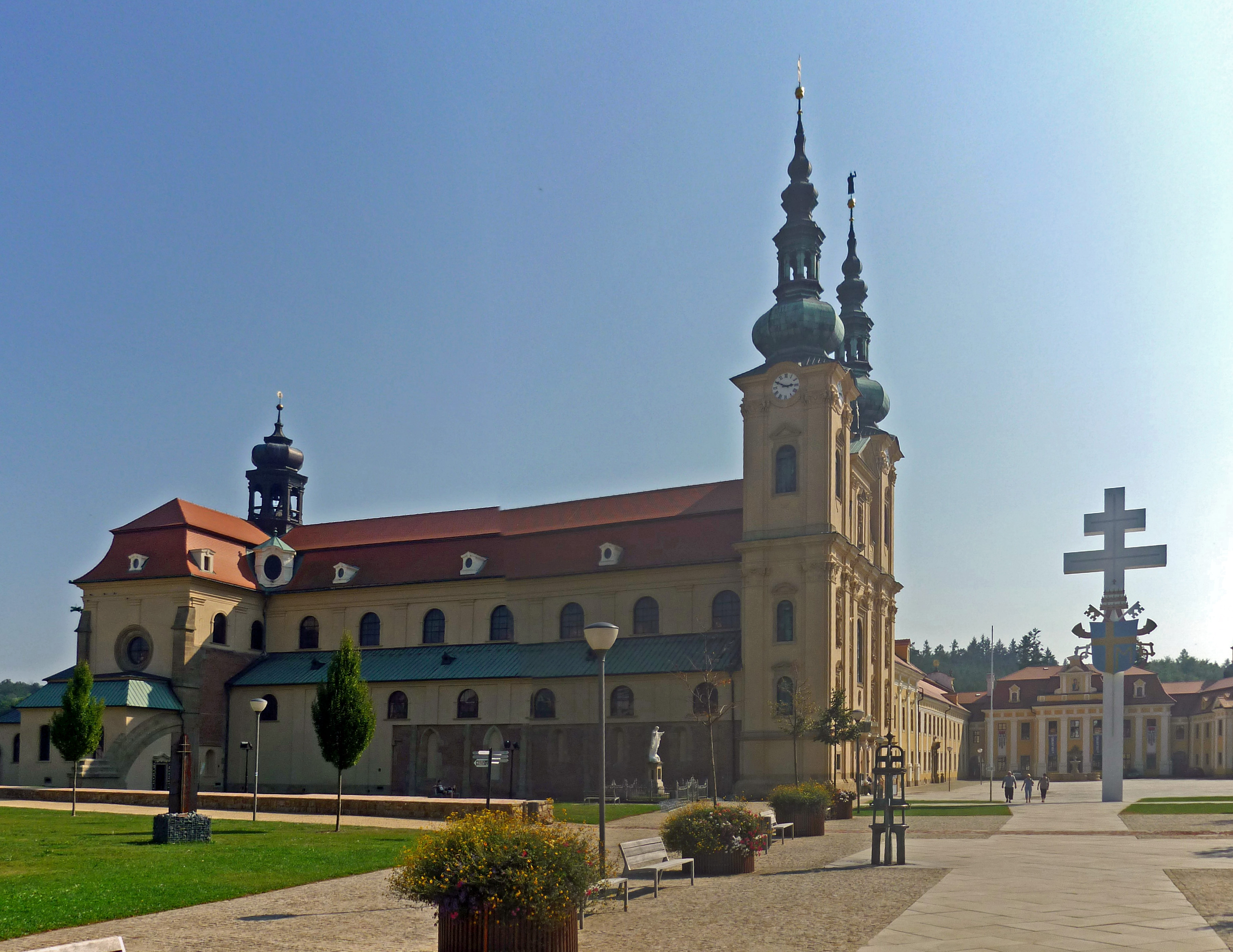 Basilika Mariä Himmelfahrt und St. Kyrill und Method in Velehrad